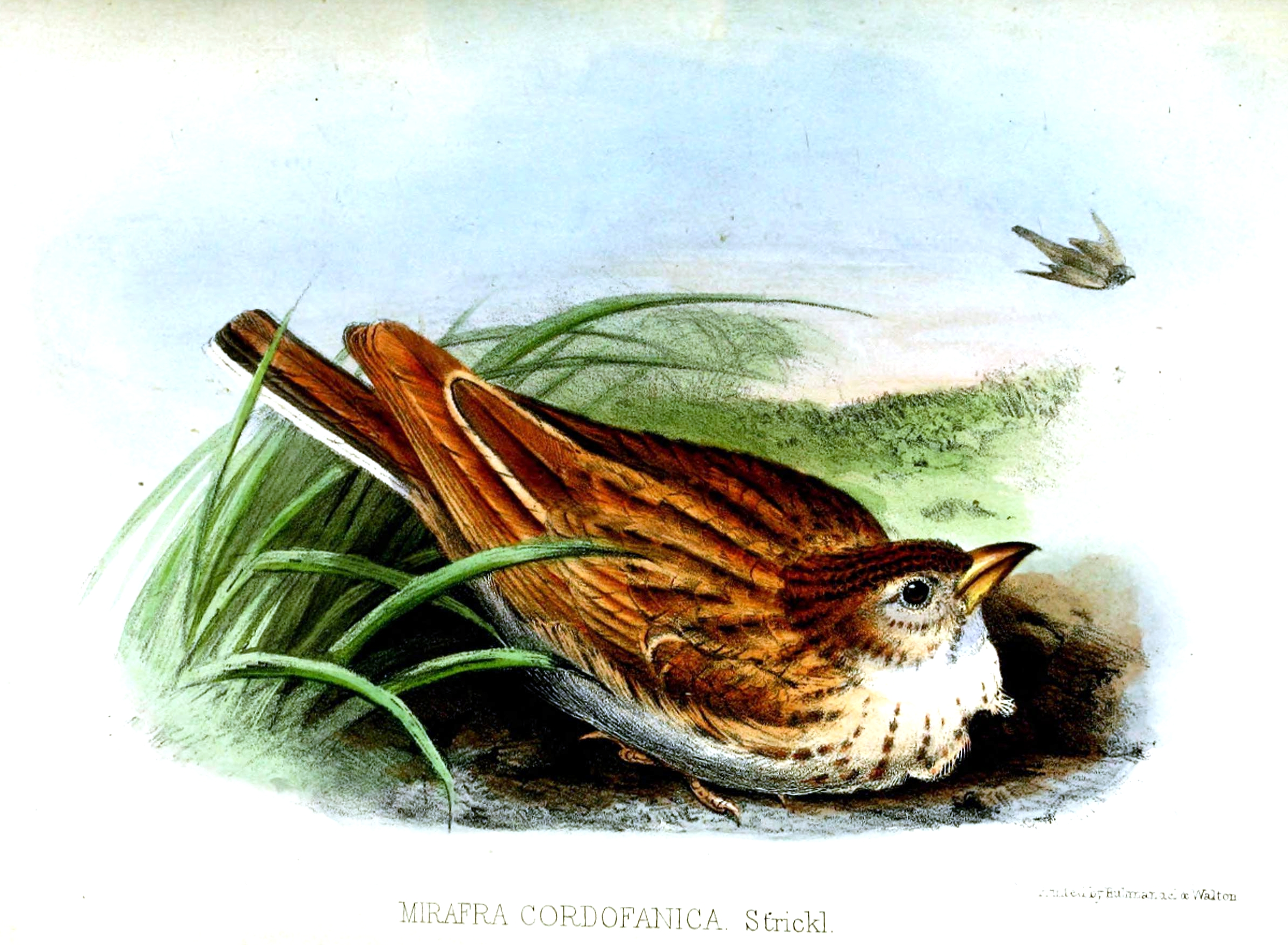 Mirafra cordofanica